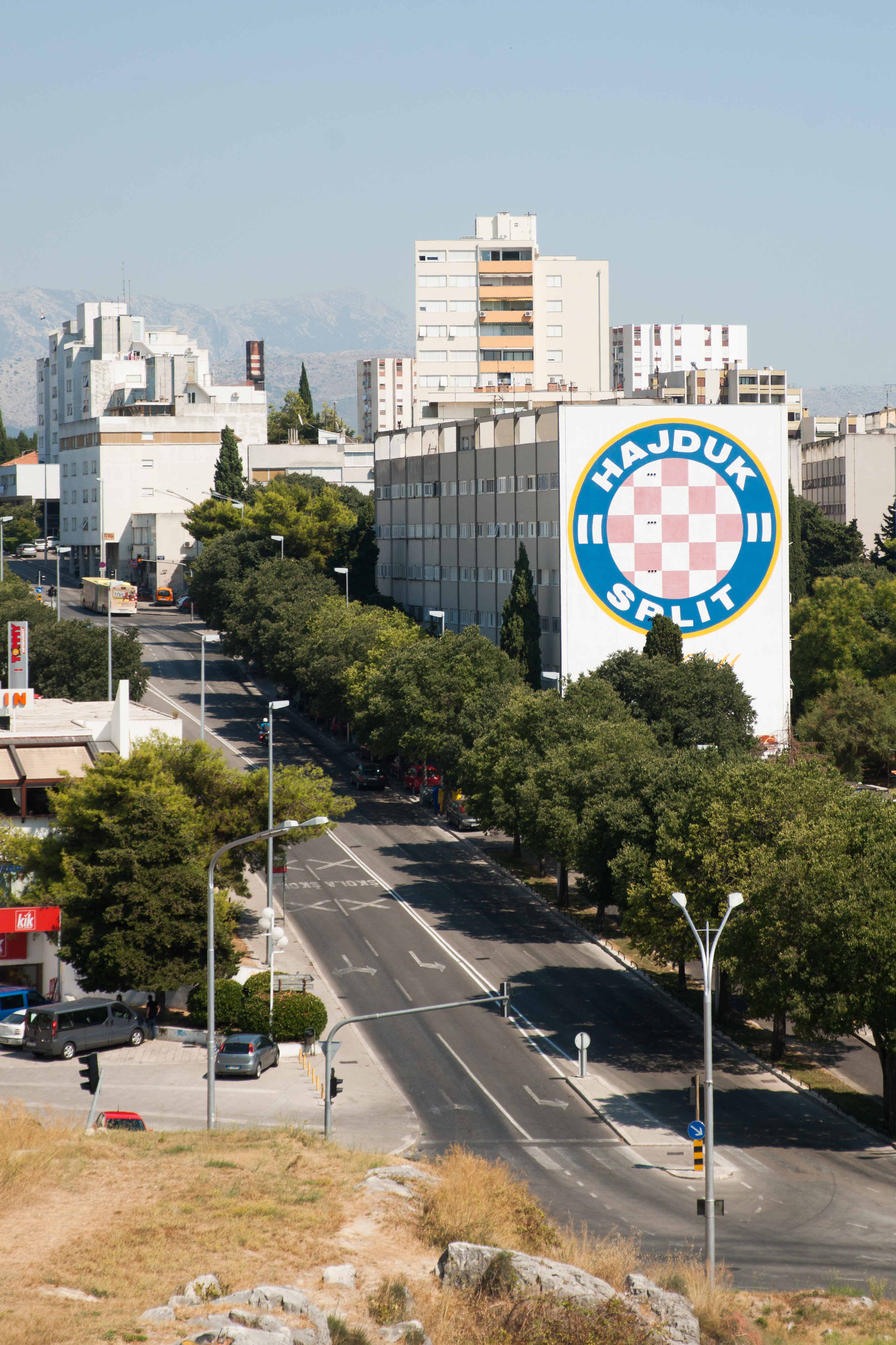 Immeuble de Split décoré aux couleurs du club de foot local, le Hajduk Split